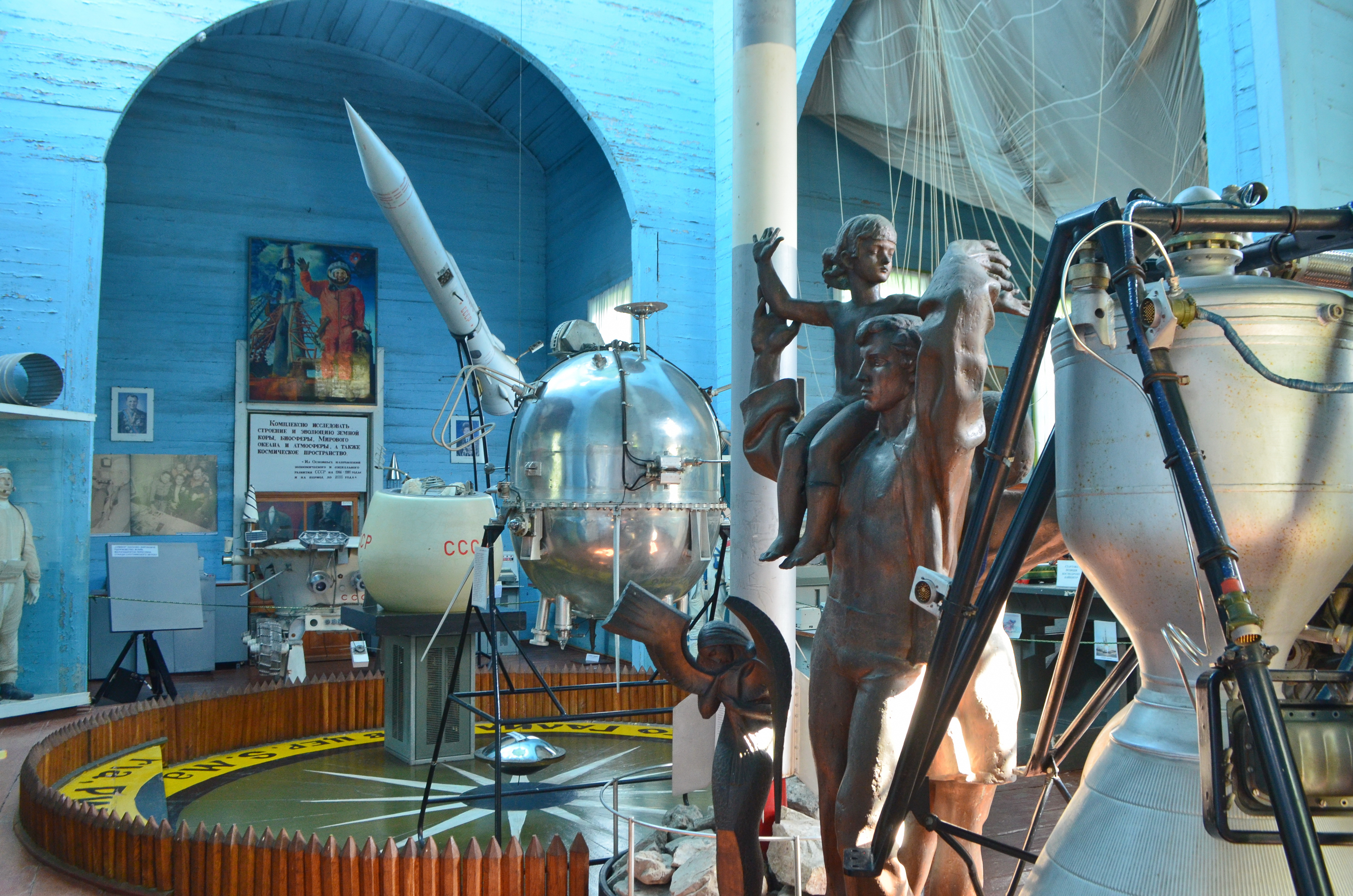 Переяслав-Хмельницький. Церква Параскеви П'ятниці з села В'юнище. 1892 р. Зараз - музей космосу.